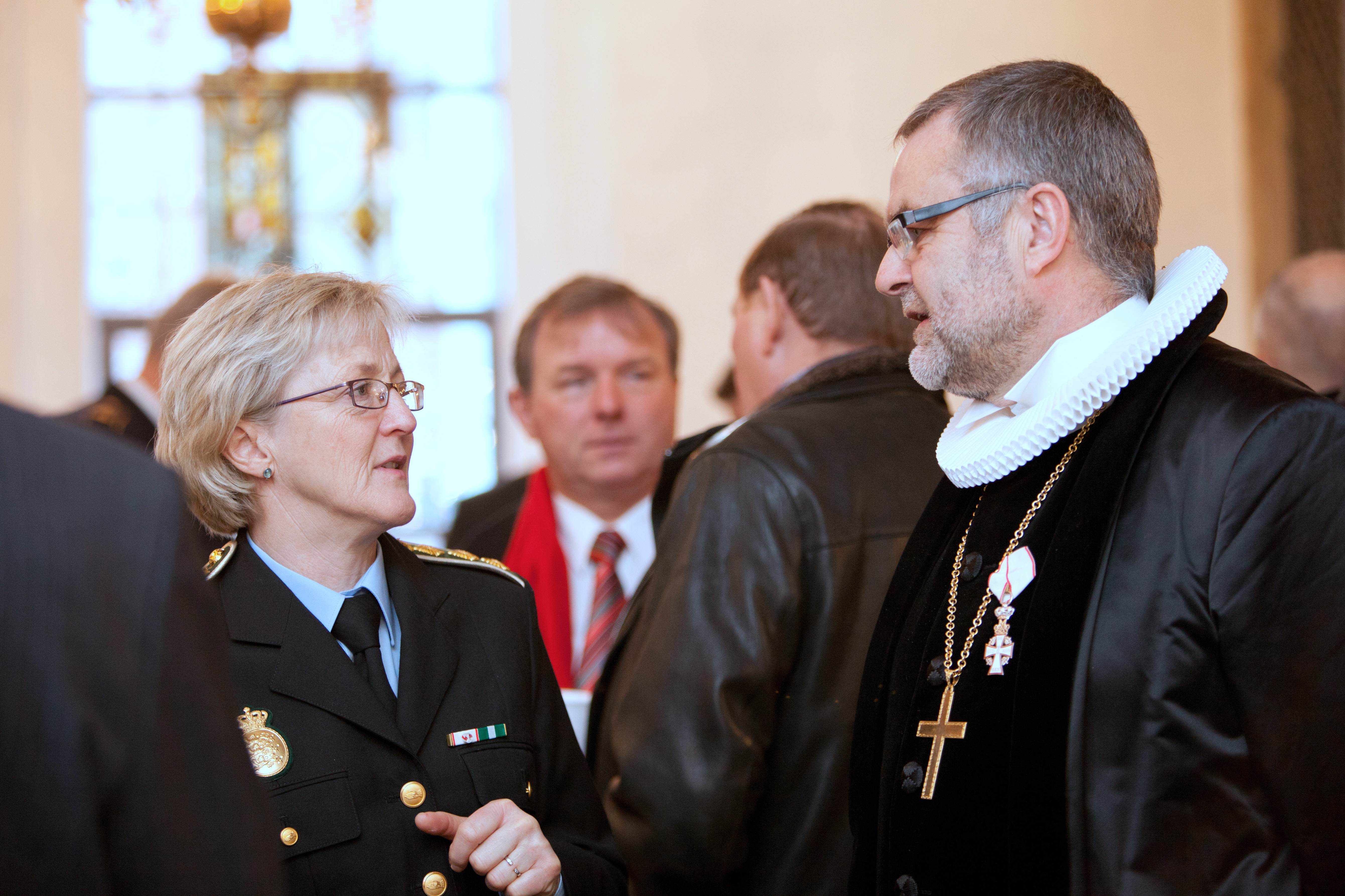 Politidirektør ved Nordjyllands Politi, Elsemette Cassøe (tv) under samtale med biskop Henning Toft Bro ved nytårgudstjenste i Budolfi Kirke i Aalborg. I baggrunden ses politiker Orla Hav.